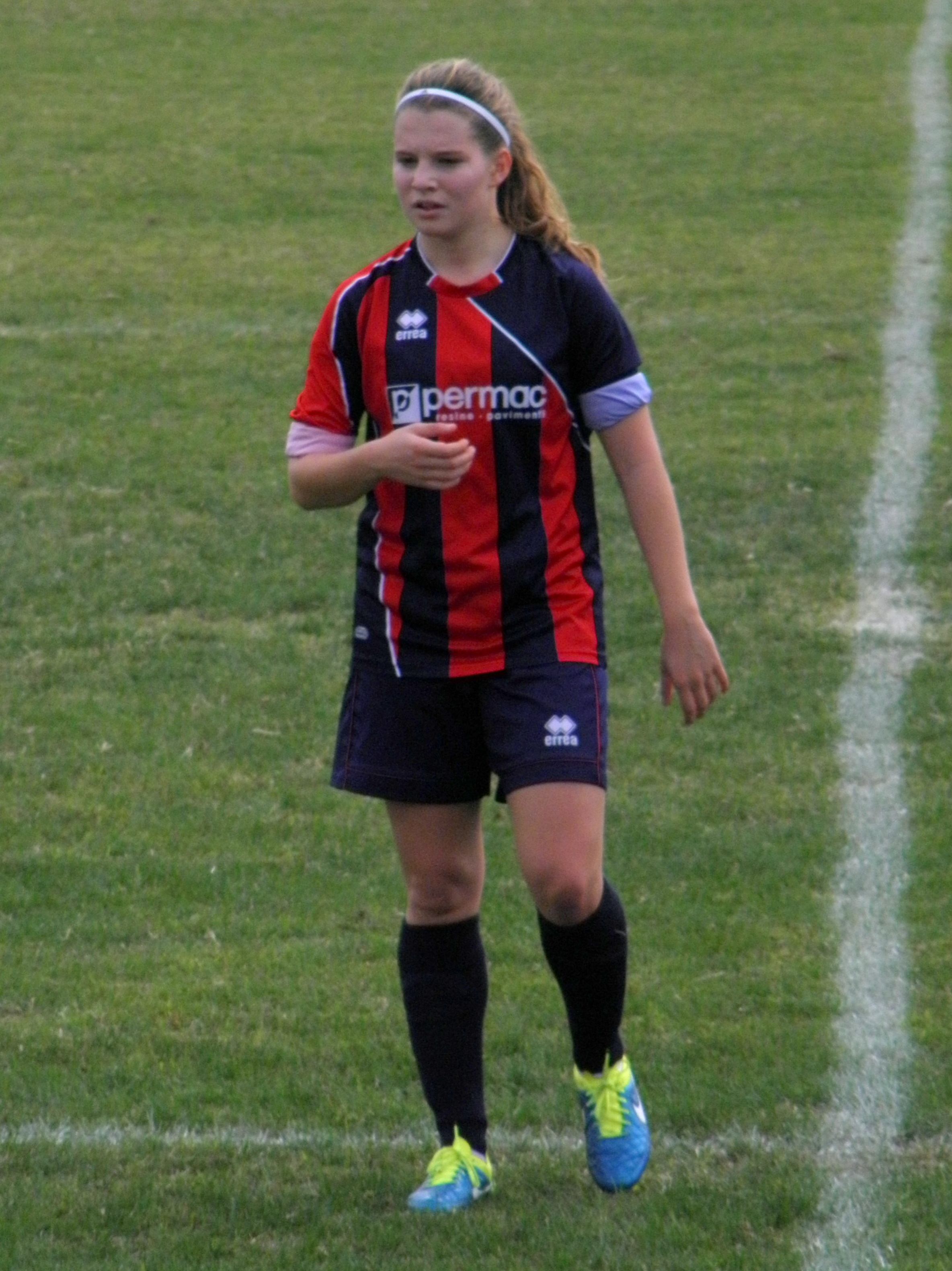 Cavarzere, Stadio Peppino Di Rorai, 11 ottobre 2015: Gordige-Vittorio Veneto, partita valida per le fasi preliminari di Coppa Italia 2015-2016.